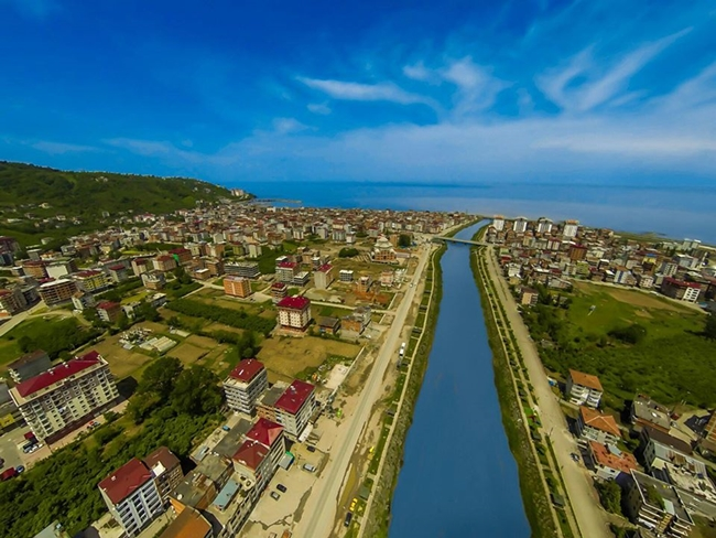 Karadere vadisinden Araklı Görünümü